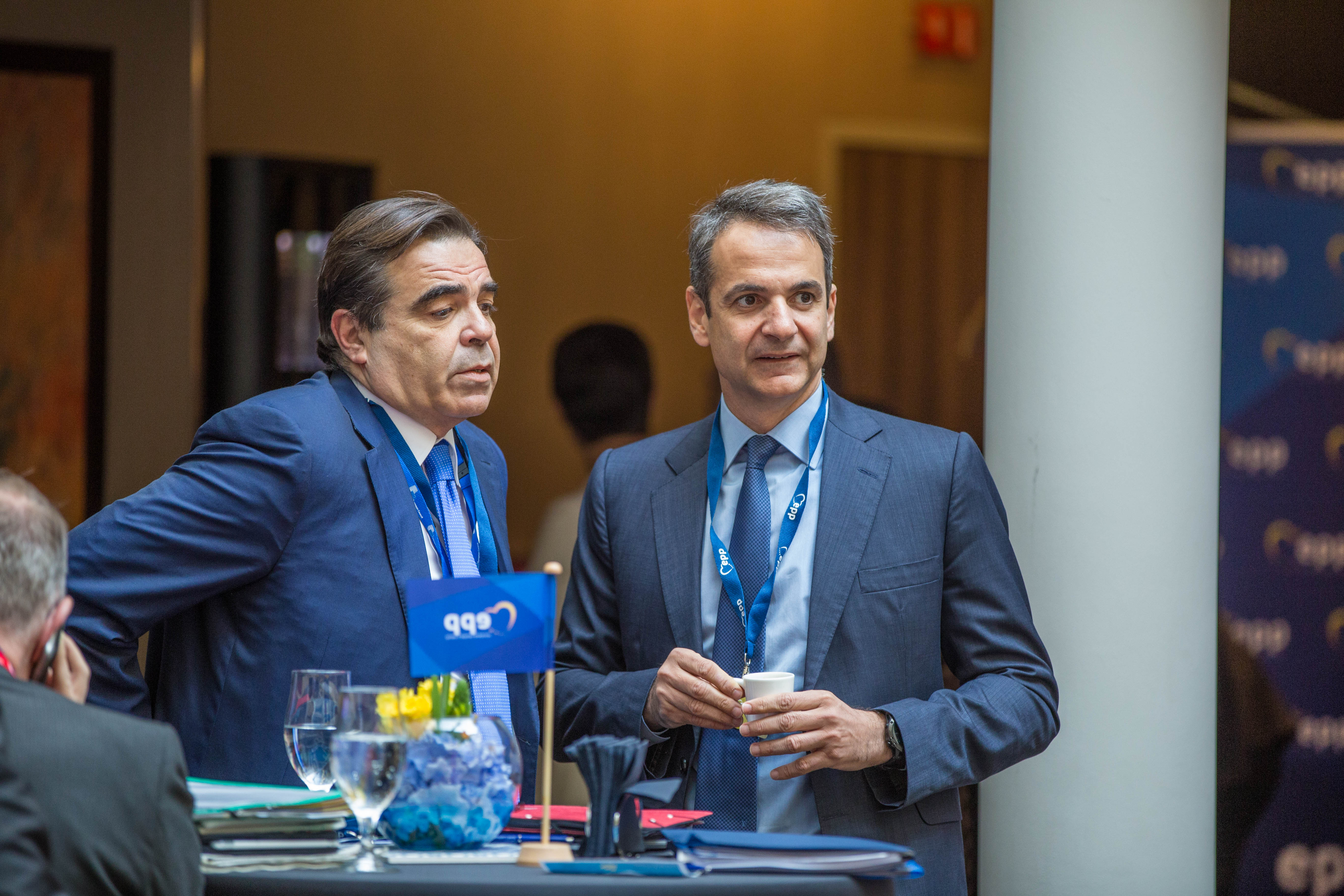 EPP Summit, Brussels, April 2017